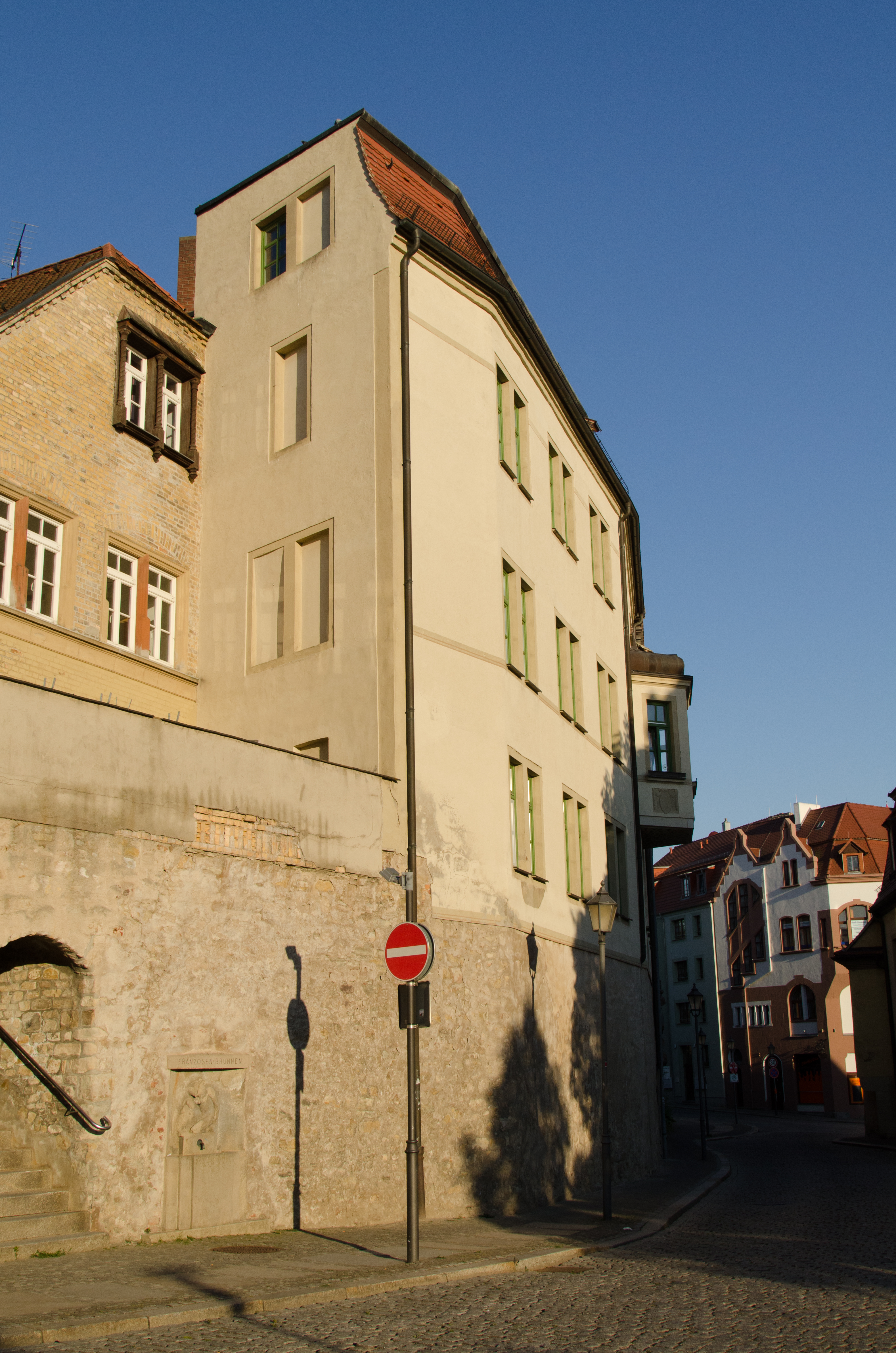 Merseburg, Domstraße 3a